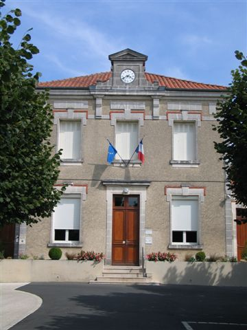 Mairie Sainte Sévère